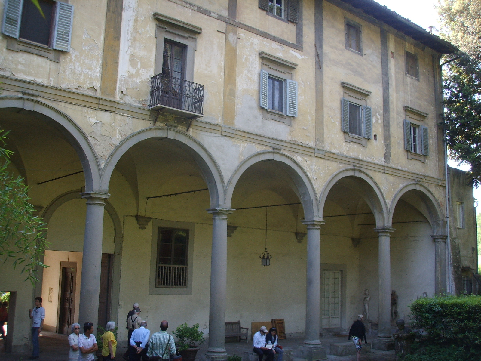 Palazzo di San Francesco di Paola, retro